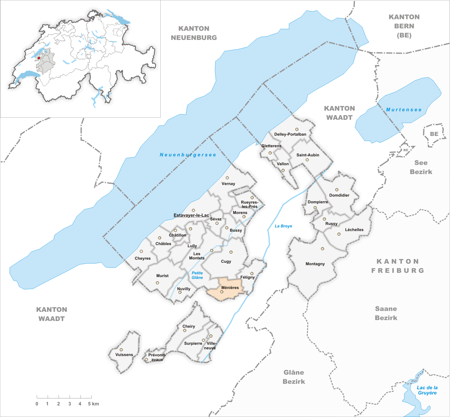 Municipality Ménières